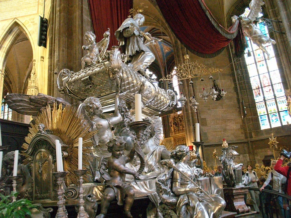 Grab des Nepomuk im Veitsdom zu Prag